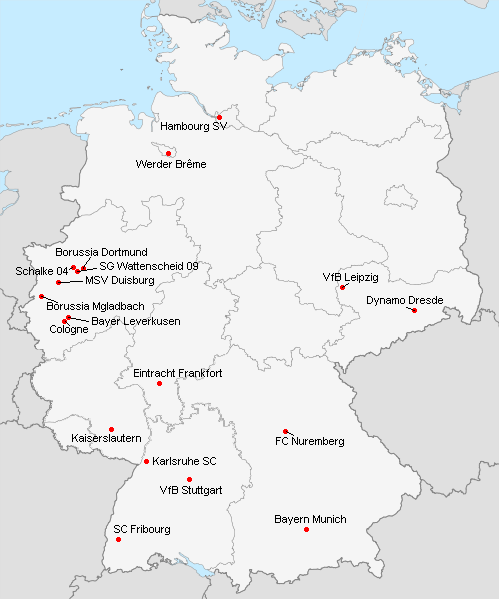 Répartition des clubs en 1.Bundesliga 1993-1994.